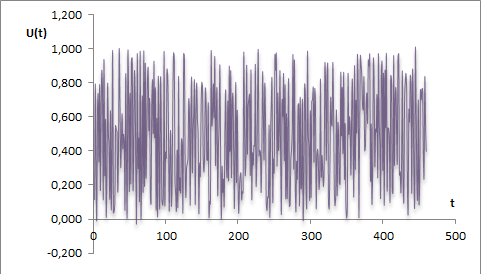 График белого шума